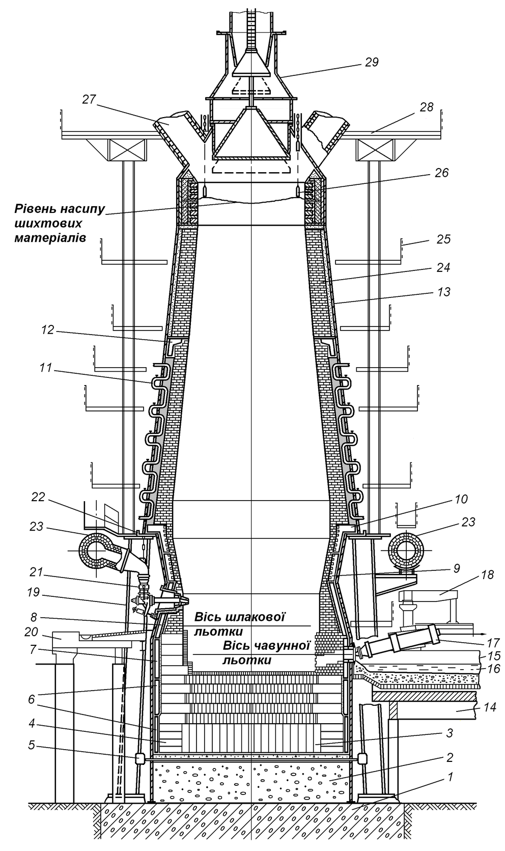 Доменна піч. Створено на основі креслень доменних печей і їхніх частин у різних підручниках з доменного виробництва і креслень доменних печей у інтернеті, зокрема креслення доменної печі на сайті Центрального державного науково-технічного архіву України.